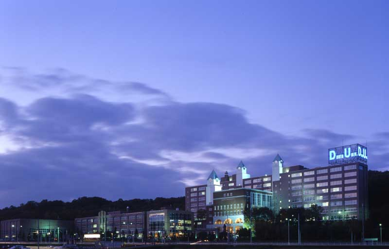 道都大学 撮影位置: 北海道北広島市、大学の斜め前方 撮影日: 2005年9月 撮影者: Tomohito 画像形式: JPEG形式、800x512ピクセル、色数24bit。